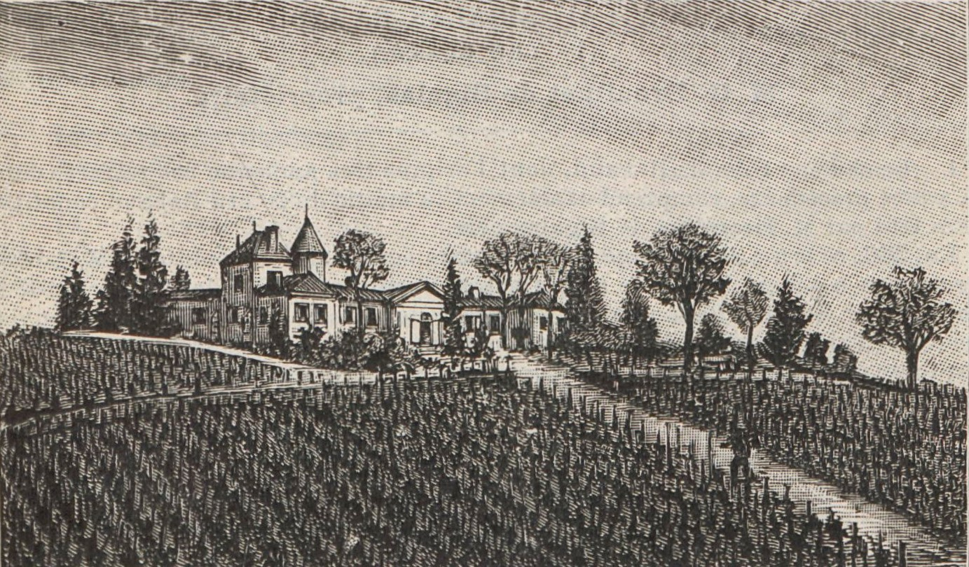 Illustration du château Rabaud-Promis dans l'ouvrage « Région de Sauternes et les vins blancs des cantons de Podensas et Langon » d'Édouard Féret publié en 1908